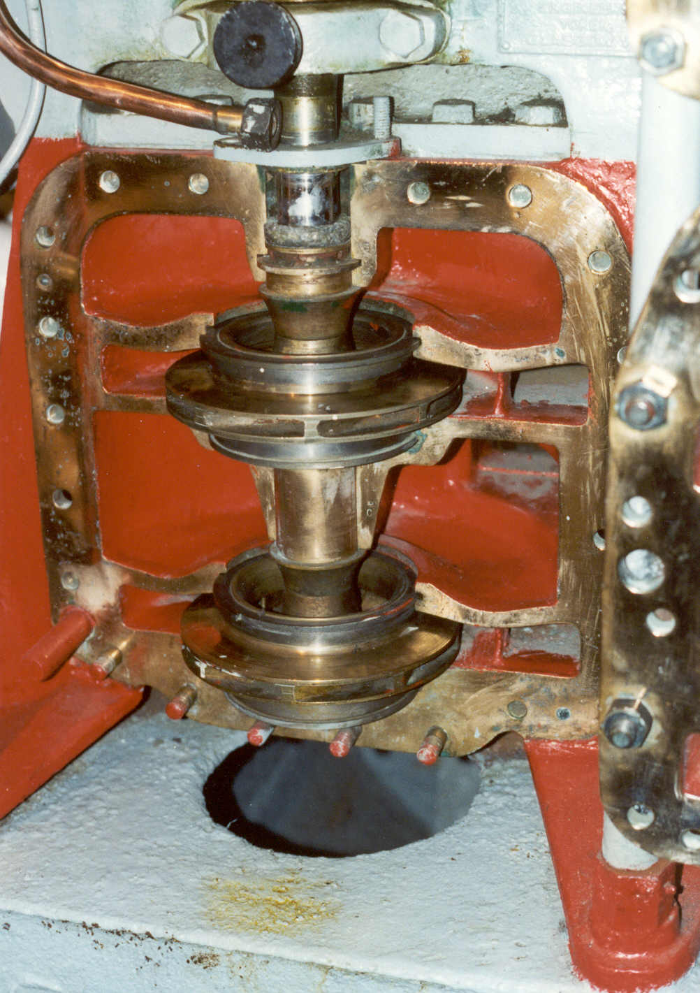 Aufgeschnittene Kühlwasserpumpe (Kreiselpumpe)